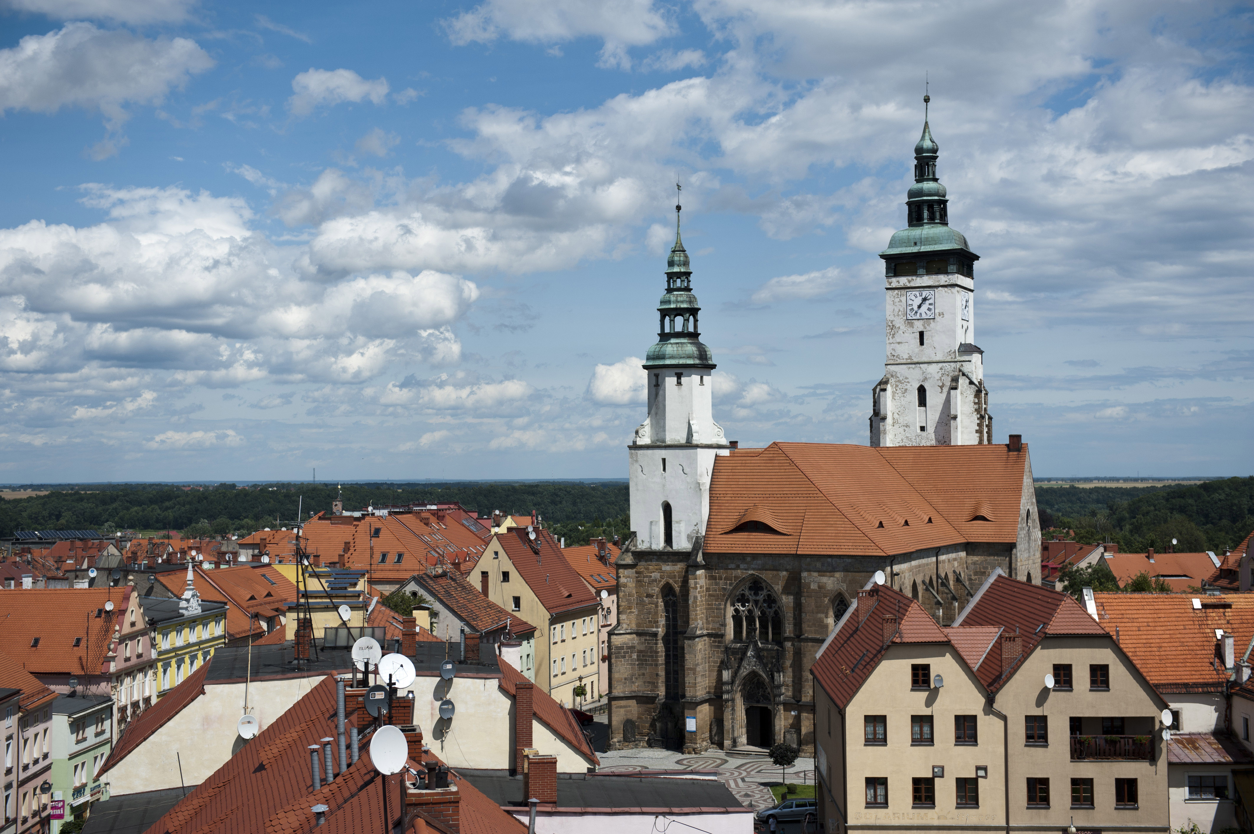 kościół pomocniczy p.w. Narodzenia NMP, 1230, XVI-XX Złotoryja, pl. Niepodległości, Złotoryja 11.1956.